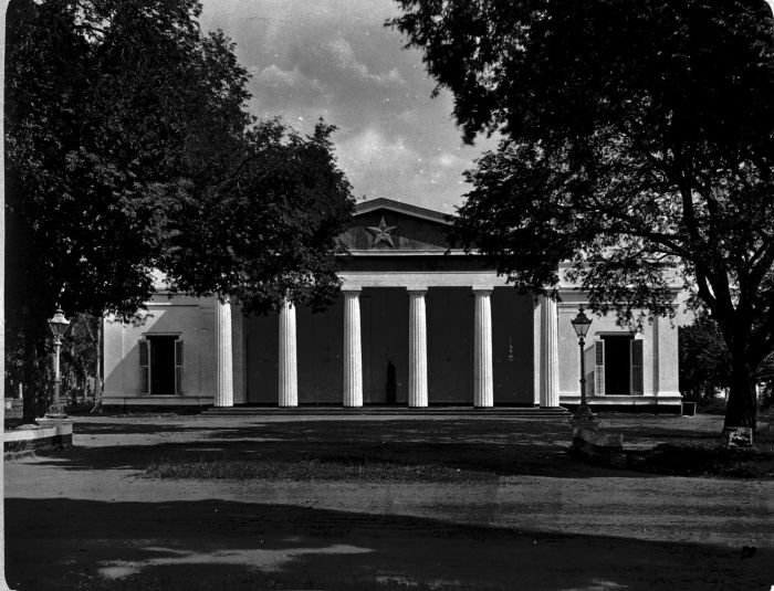 Foto. Het oudste gebouw van de Vrijmetselarij in Weltevreden, Batavia.